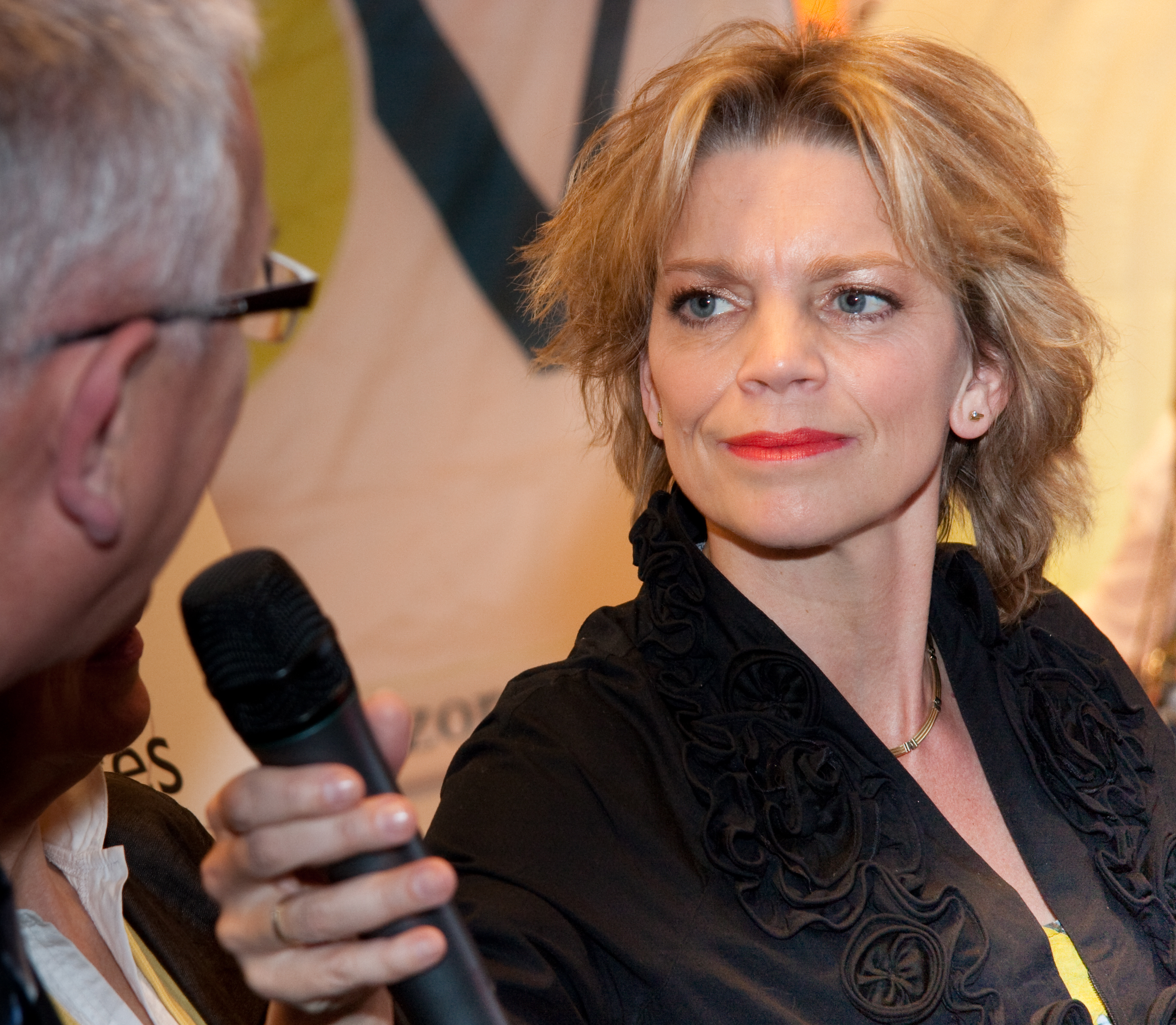 Inge Diepman (Zutphen, 19 september 1963) is een voormalige Nederlandse presentatrice bij de Publieke Omroepvereniging VARA. -- Inge Diepman, dagvoorzitter tijdens de Nederlandse Diabetes Dag op 26 maart 2010 in de Jaarbeurs te Utrecht.